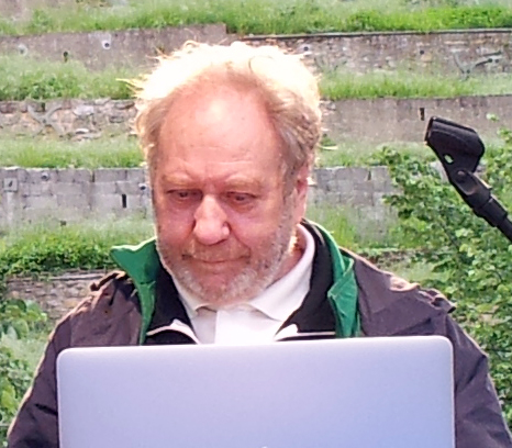 Jackie Berroyer mixant aux Nuits Sonores 2013 aux Subsistances à Lyon